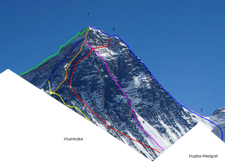 Südwestwand des Mount Everest, vom Kala Patthar aus